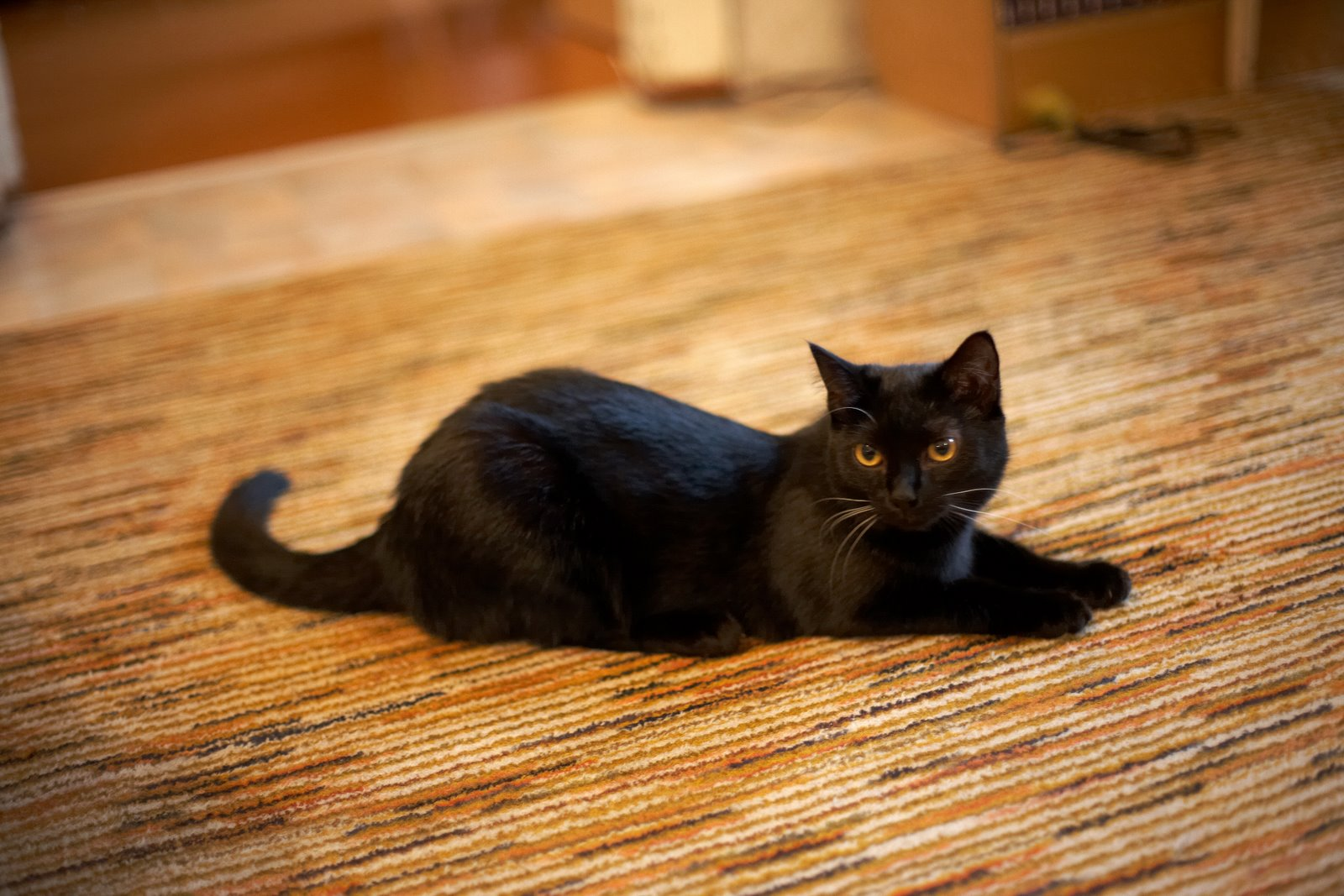 Novokuznetsk